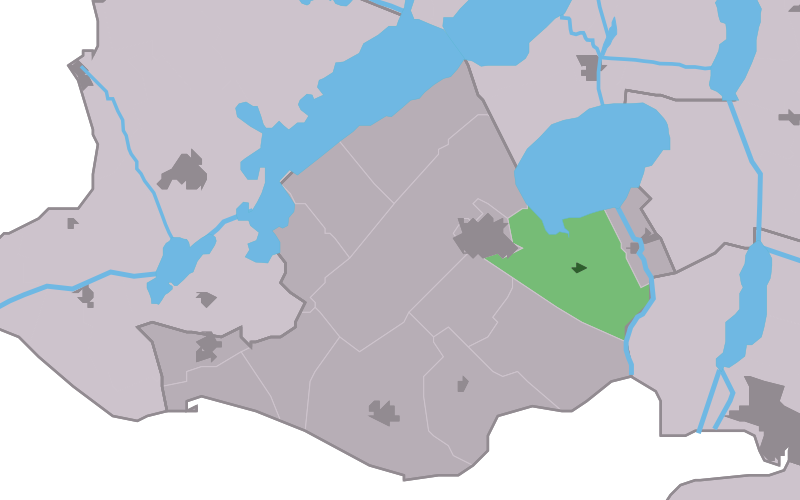 Kaartsje fan himrik fan Wikel